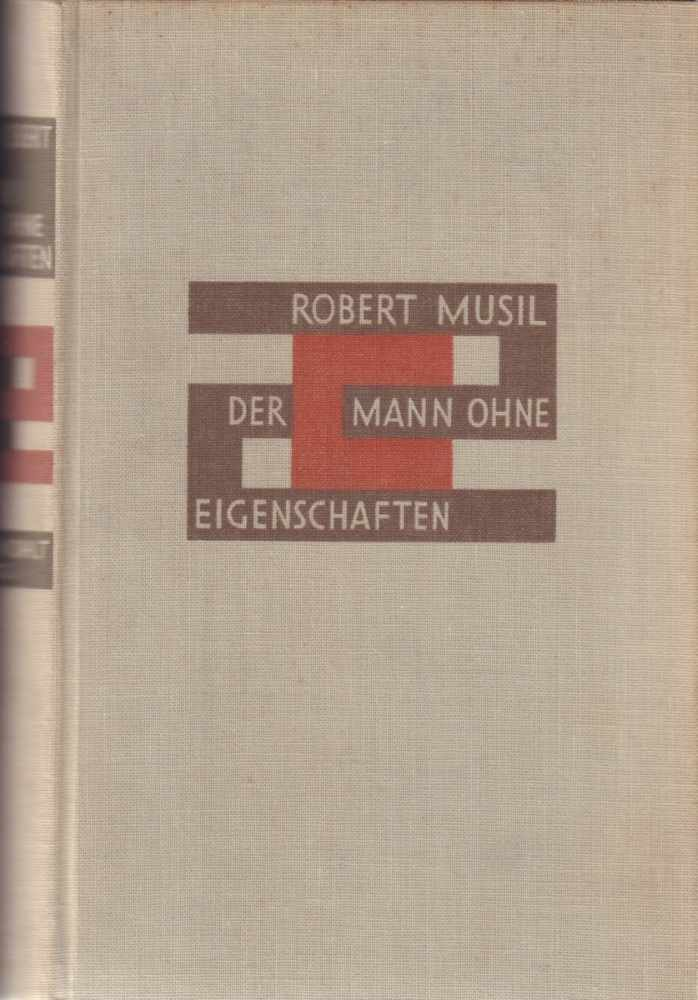 Robert Musil: Der Mann ohne Eigenschaften, Band 1. Rowohlt Verlag, 1930